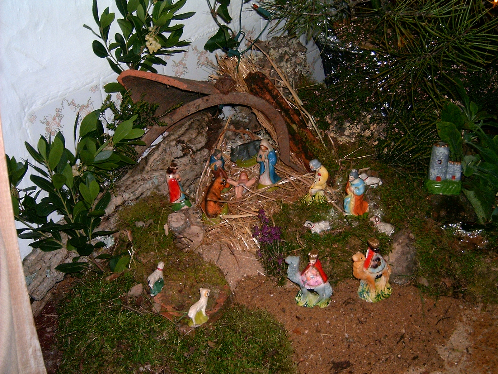 Presépio tradicional em Portugal, com peças soltas Photo by Manuel Anastácio